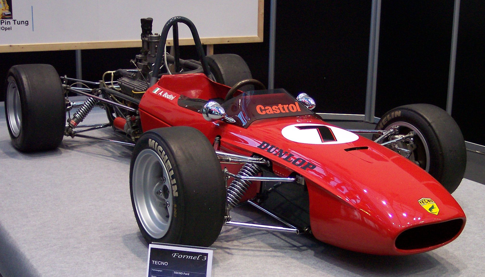 Description: Tecno Alceste Bodini 1967 Formula 3 Source: Eigenes Bild